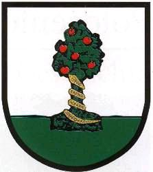 Herb Zbrosławic (gmina Zbrosławice, powiat tarnogórski, województwo śląskie, Polska)